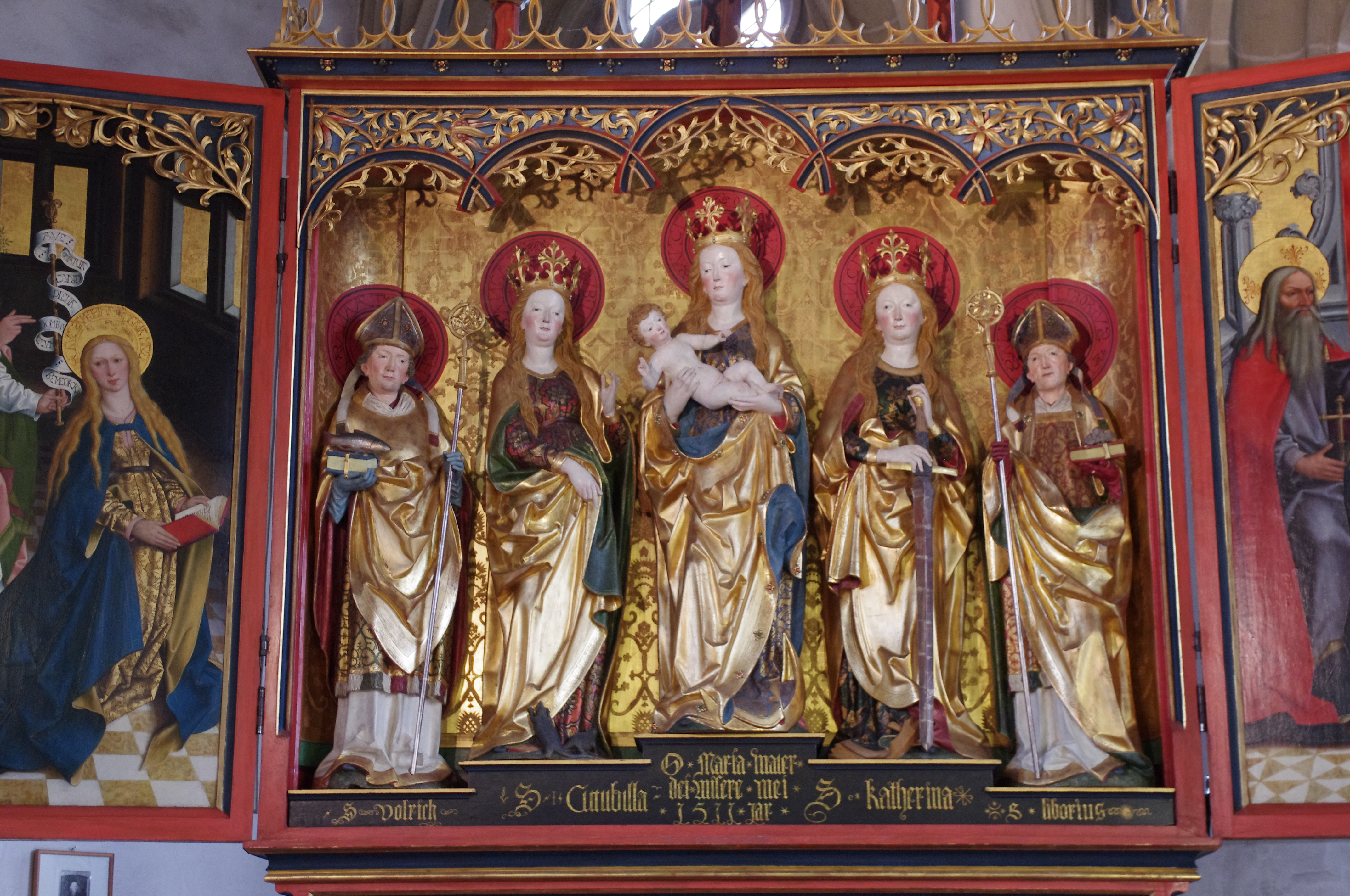 Ulrichskapelle im Kloster Adelberg, Schrein des Altars